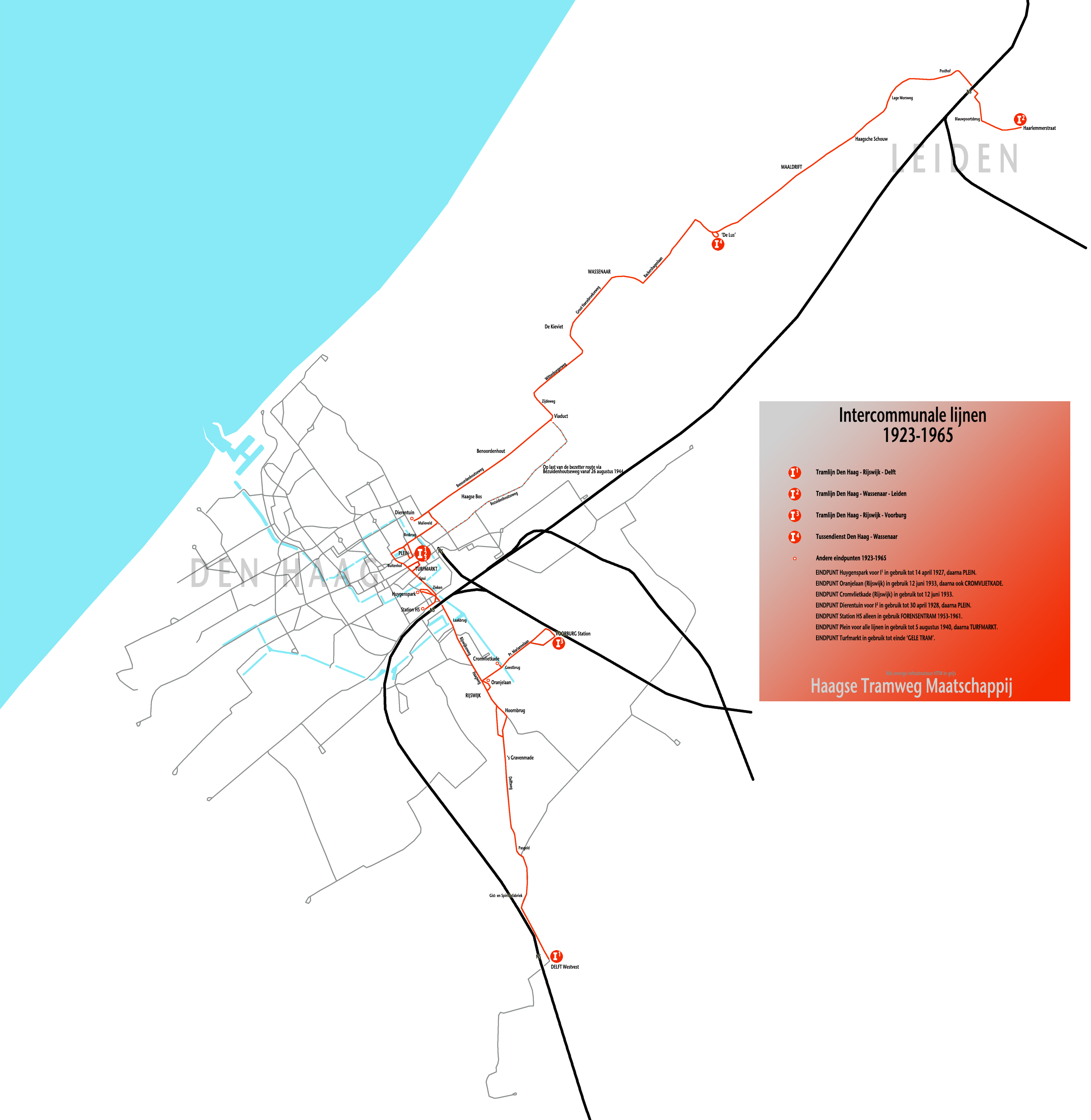 Kaartje van de intercommunale Haagse tramlijnen